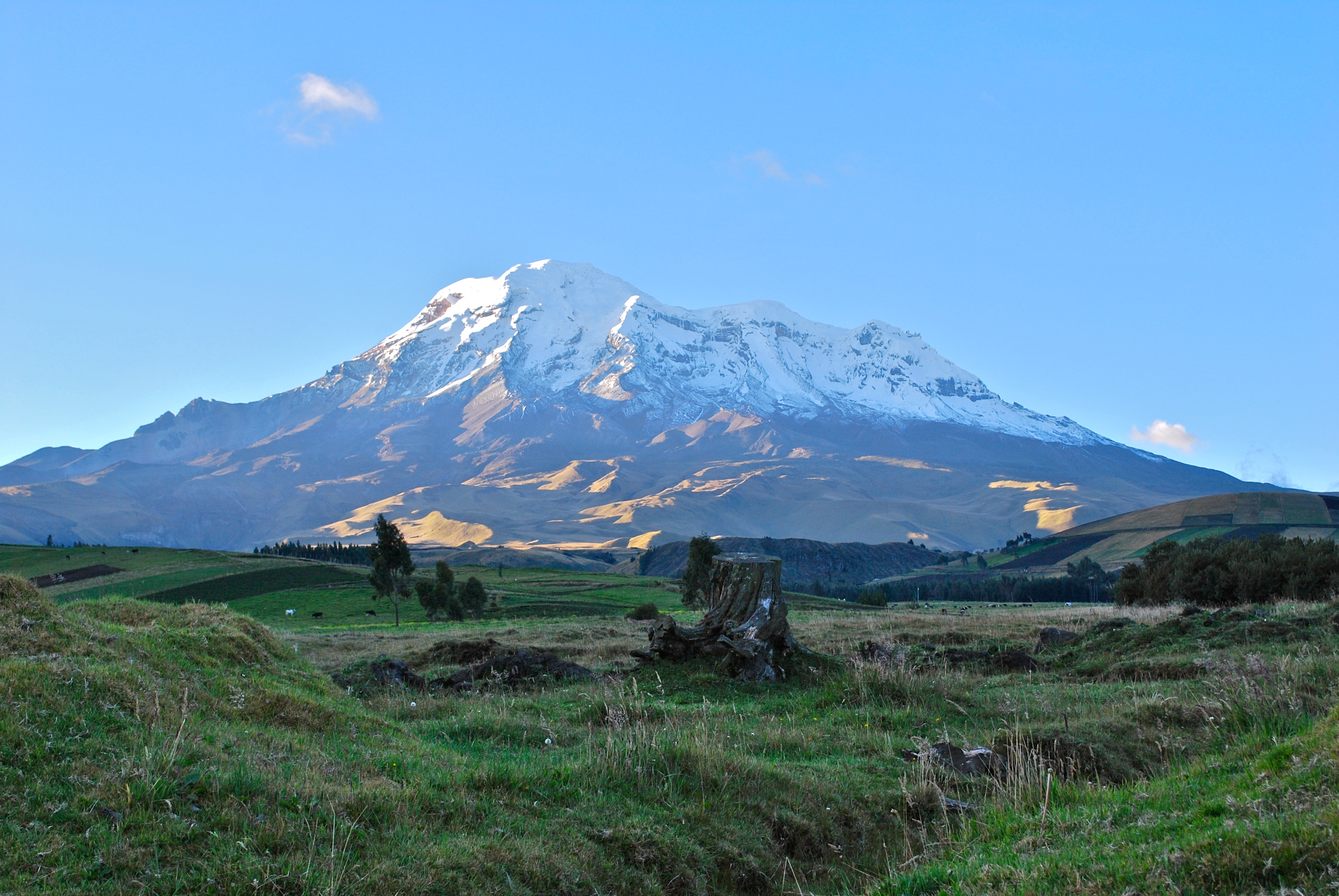 Volcán Chimborazo visto desde la carretera en San Juan, a 15 minutos de Riobamba